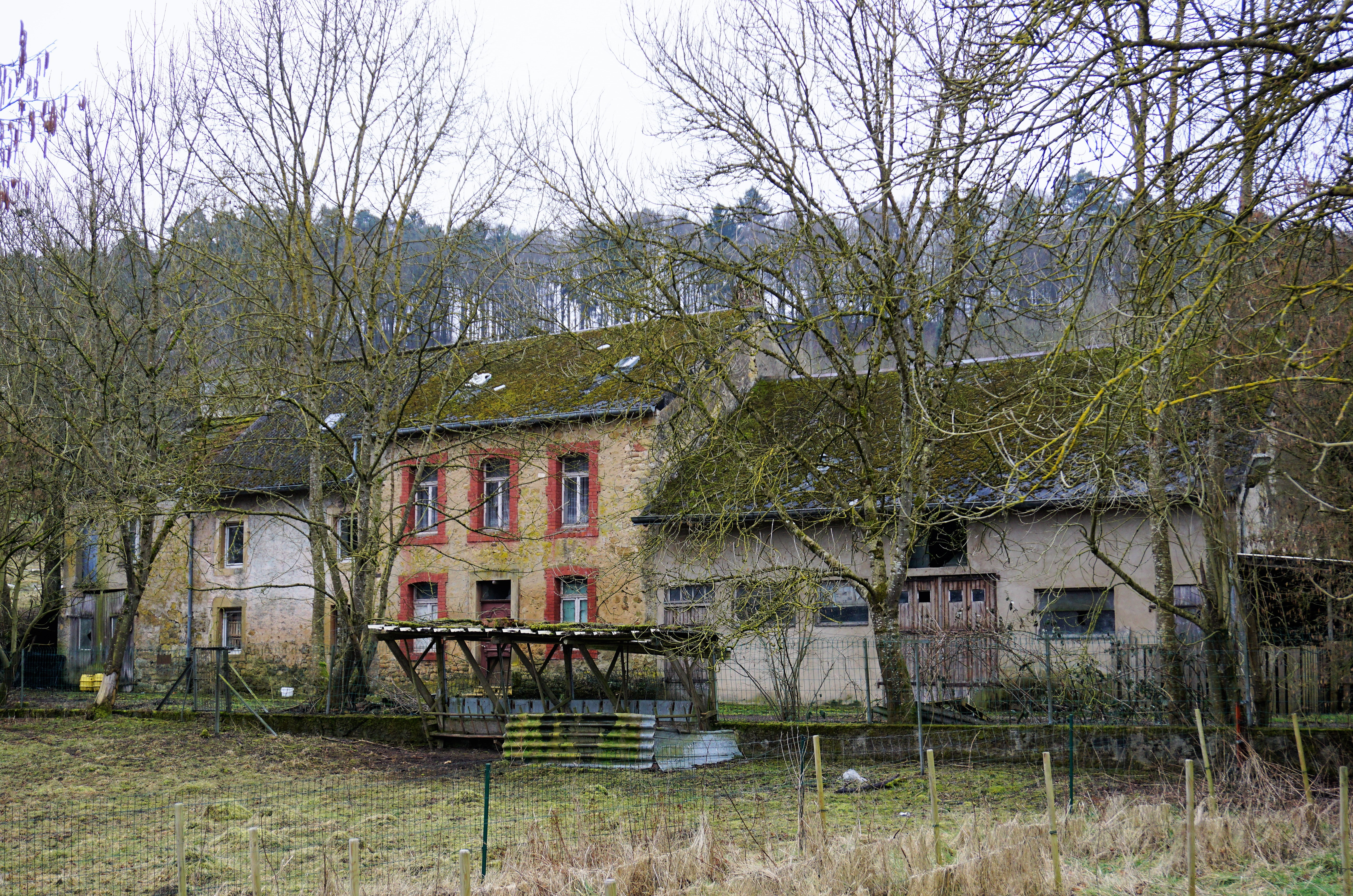 Lorentzweiler, ancien moulin "Colmeschmillen".